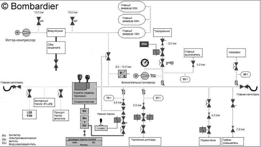 Сильно упрощенная пневматическая схема электровоза BR 185